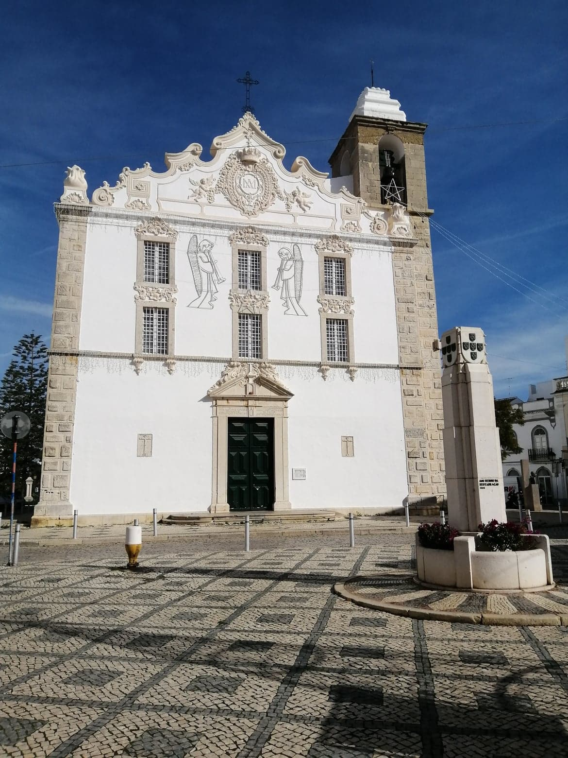 Igreja de Nossa Senhora do Rosário